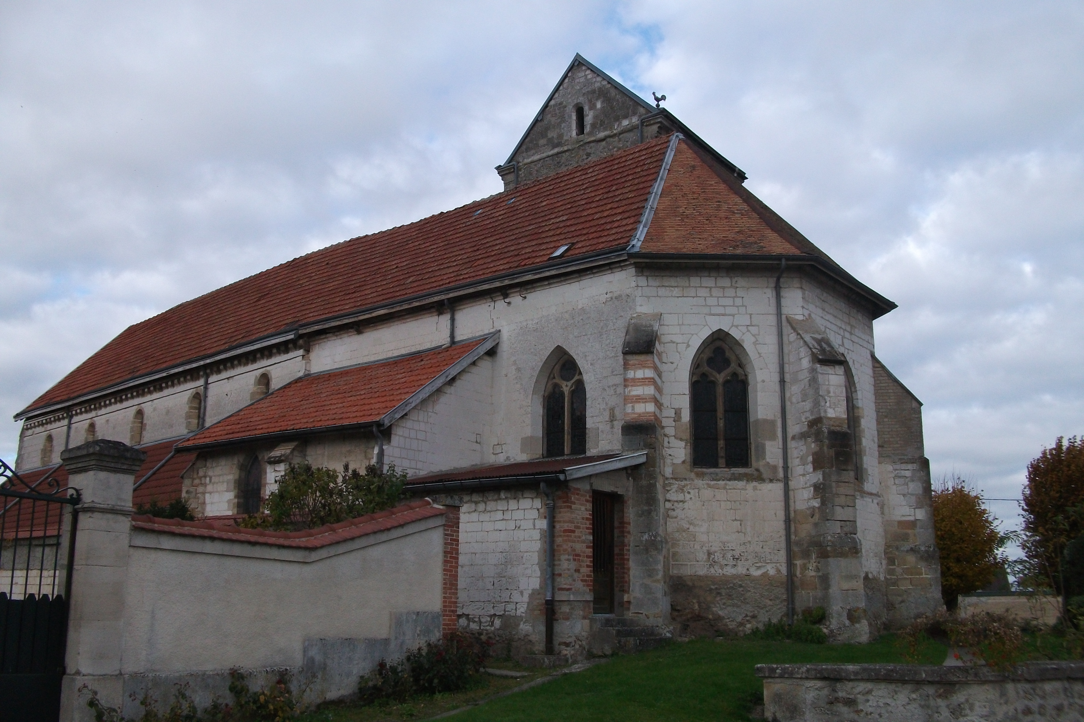 Bouy, son église vue de l'arrière.